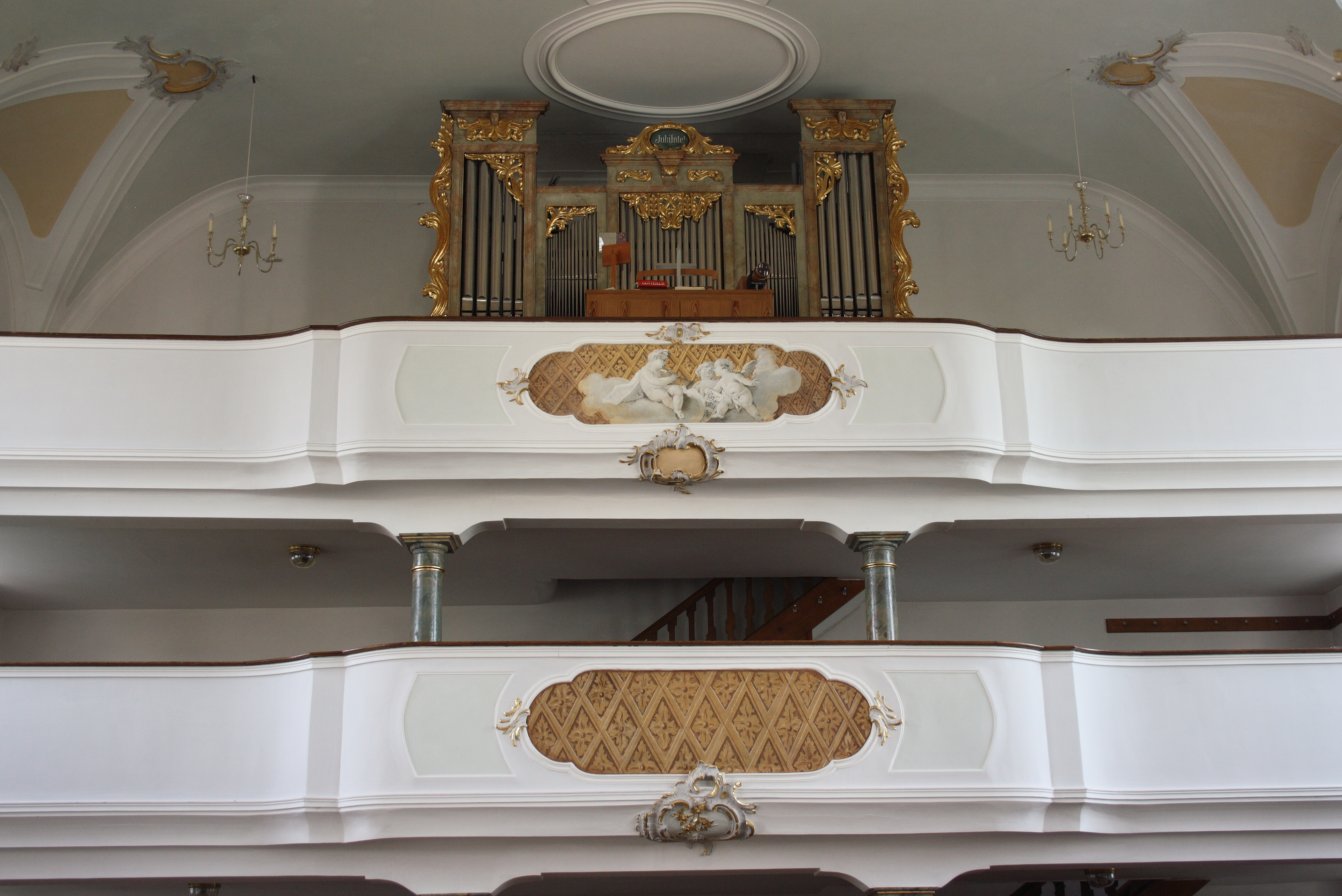 Katholische Pfarrkirche Mariä Himmelfahrt in Ettenbeuren, einem Ortsteil der Gemeinde Kammeltal im Landkreis Günzburg (Bayern), Doppelempore